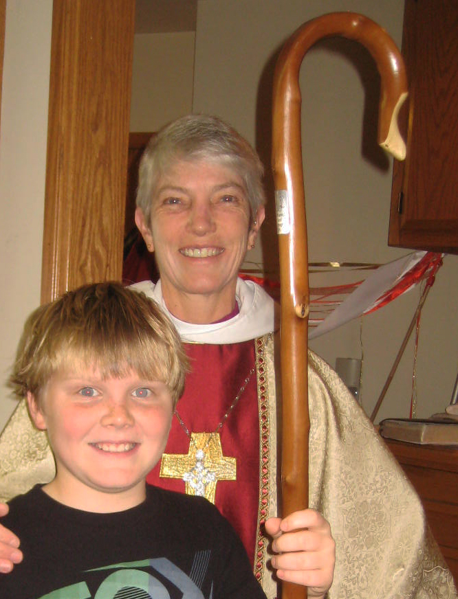 Мэри Глэсспул, викарный епископ Лос-Анджелесского диоцеза Епископальной церкви. Перед службой